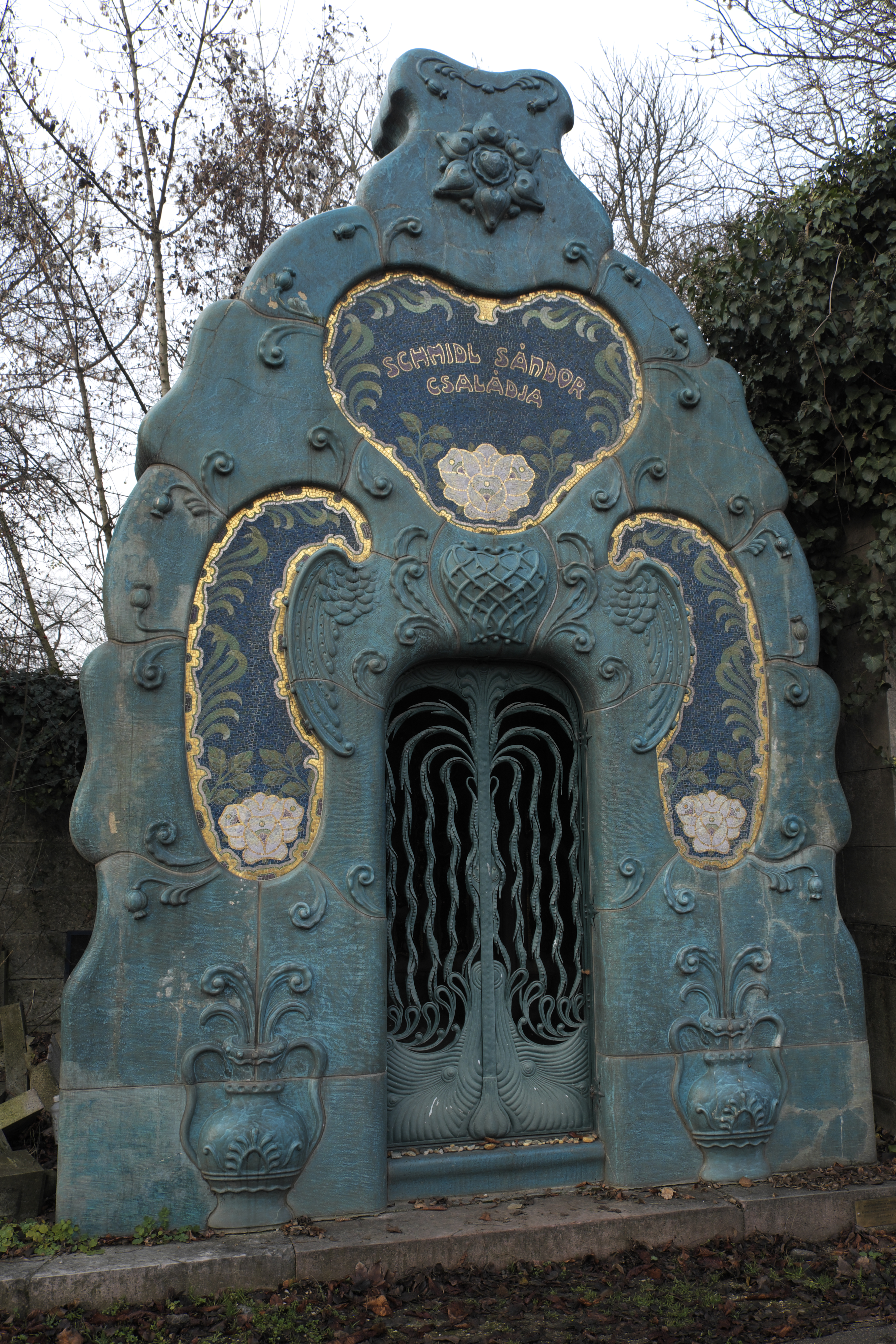 Jüdischer Friedhof an der Kozma utca in Budapest in Ungarn, Schmidl Mausoleum